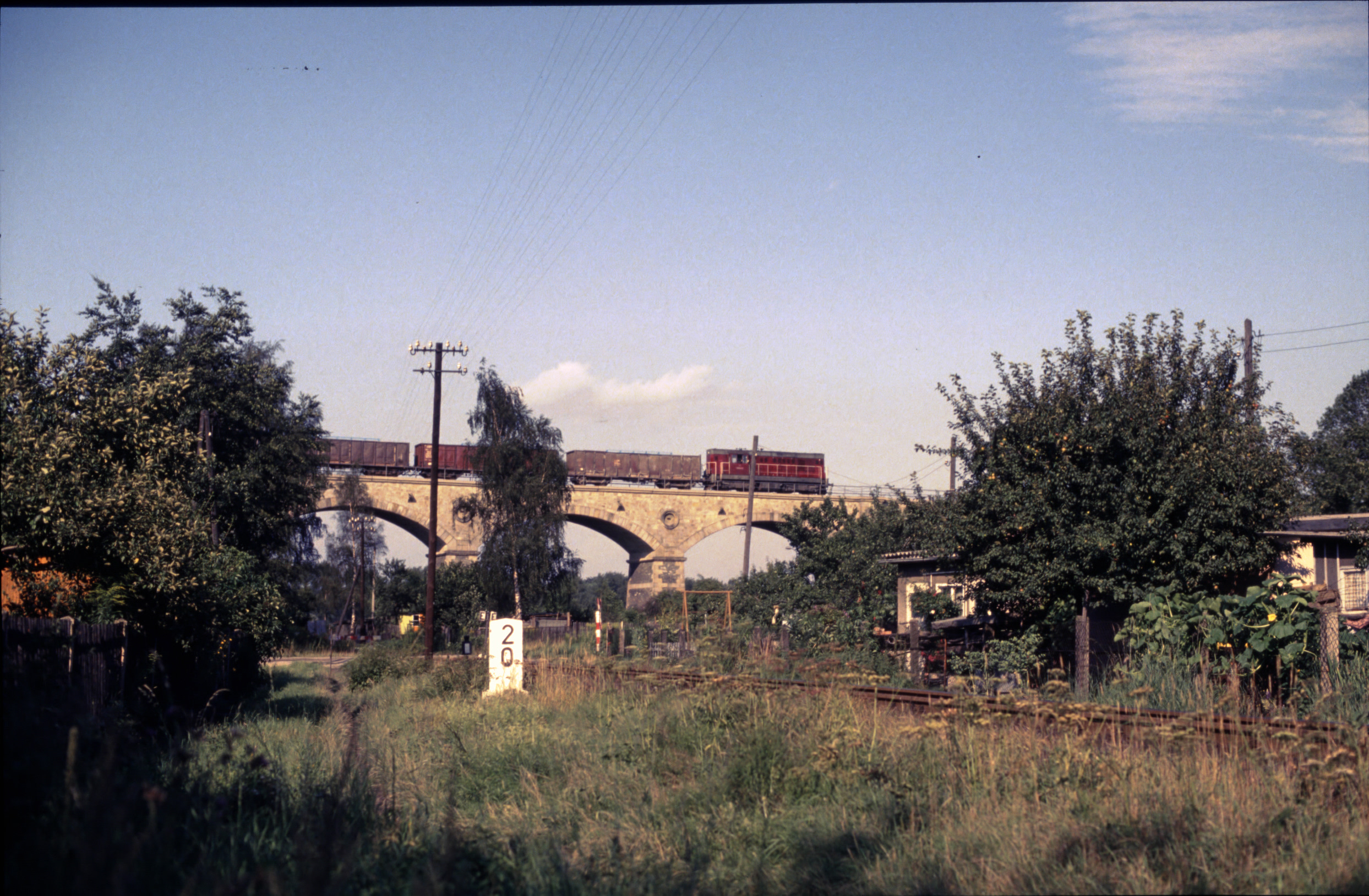 T 435.0 auf Neißeviadukt Zittau - Hrádek nad Nisou.